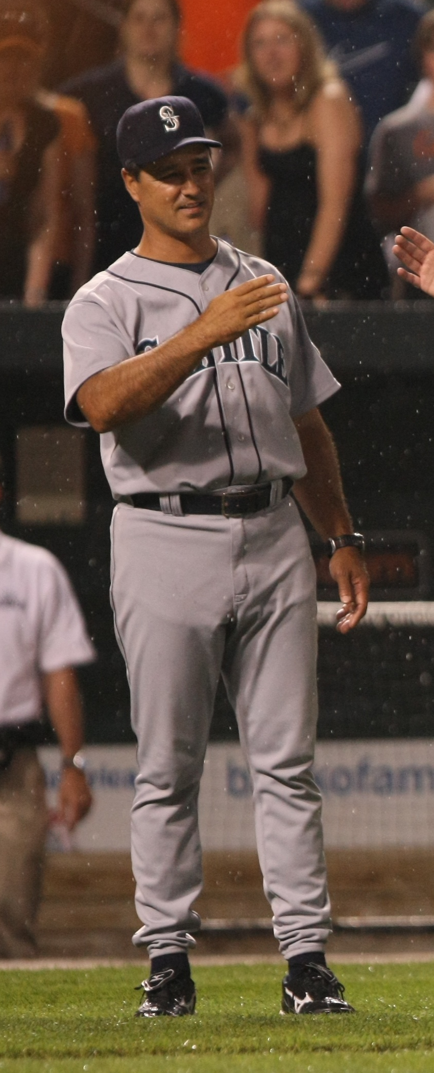 Don Wakamatsu